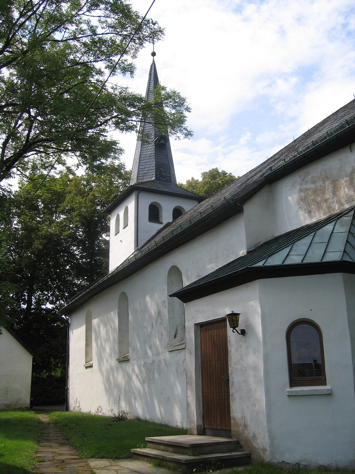 Evangelische Pfarrkirche in Schalksmühle-Heedfeld. Tonnengewölbte Saalkirche aus dem Jahr 1720 mit verputztem Bruchsteinmauerwerk und dreigeschossigem Turm. Eingetragen in der Denkmalliste seit dem 15. Dezember 1983.